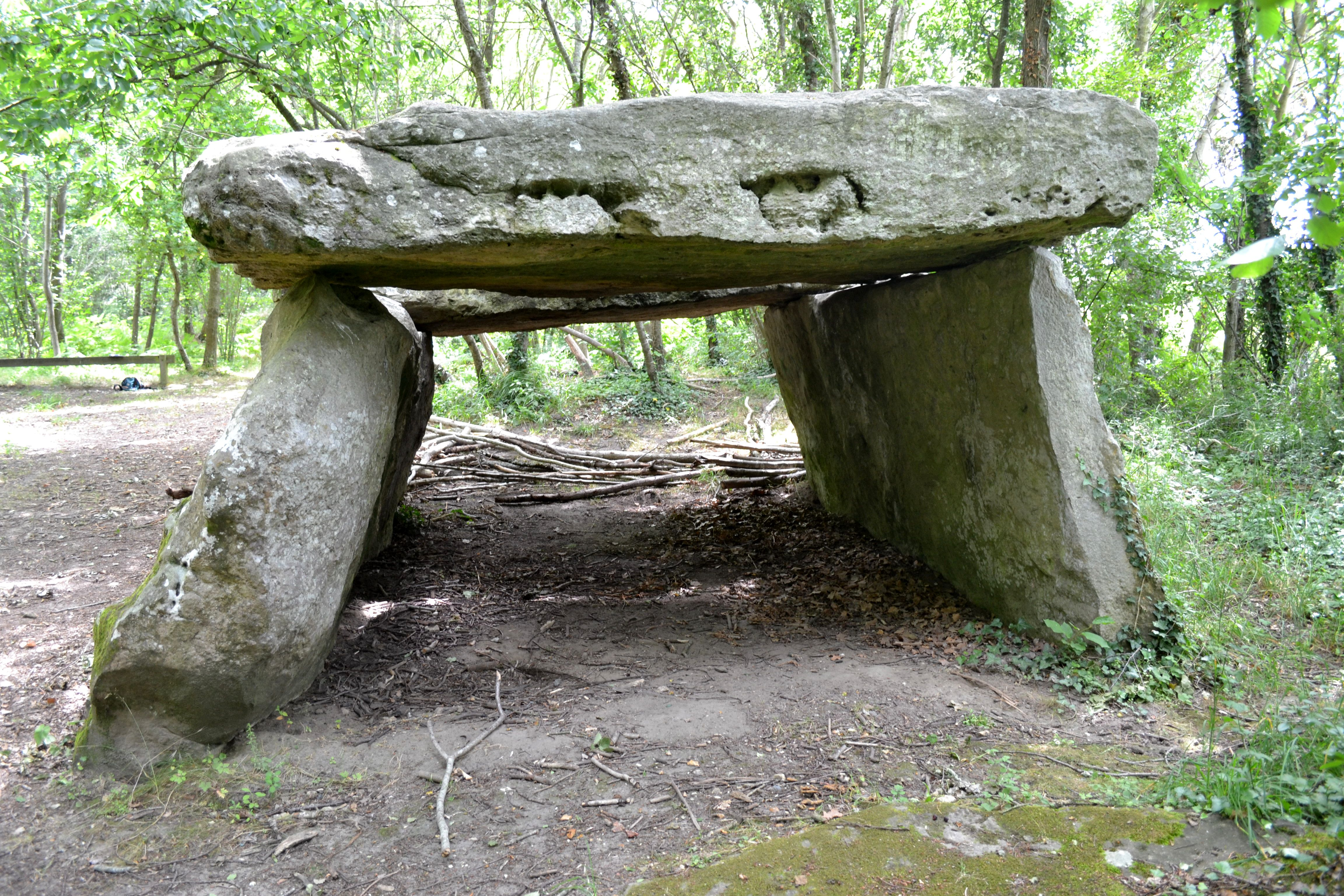 Pierre Couverte du Moulin de Piau à Chemellier (49).